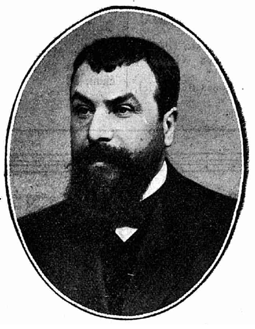 Vasile G Morţun - ministrul lucrărilor publice (România) în 1910